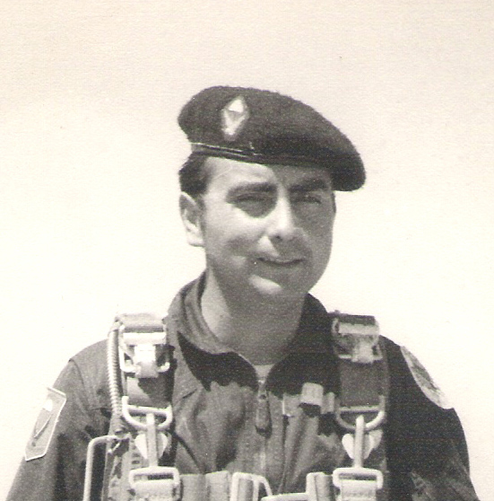 Teniente (DA) Leonardo Antonucci Salazar en la decada de 1970 con uniforme de presentación de los Paracaidistas "Boinas Azules"